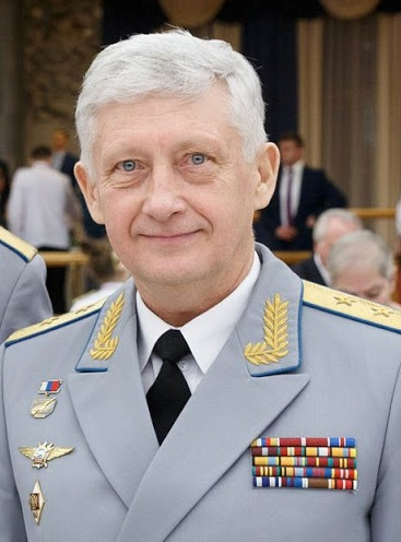 Командующий военно-воздушными силами — заместитель главнокомандующего Воздушно-космическими силами генерал-лейтенант Дронов Сергей Владимирович